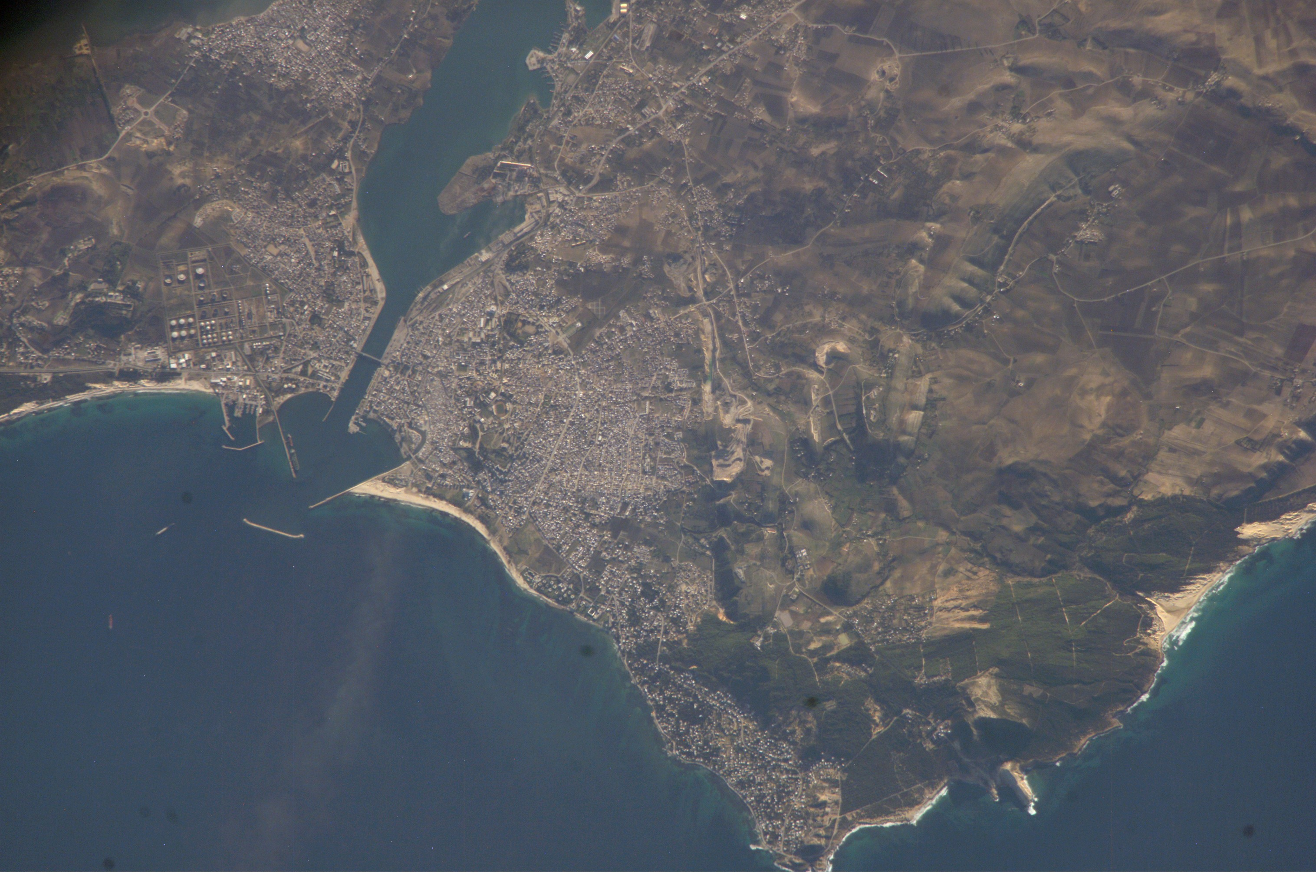 Image satellite de Bizerte